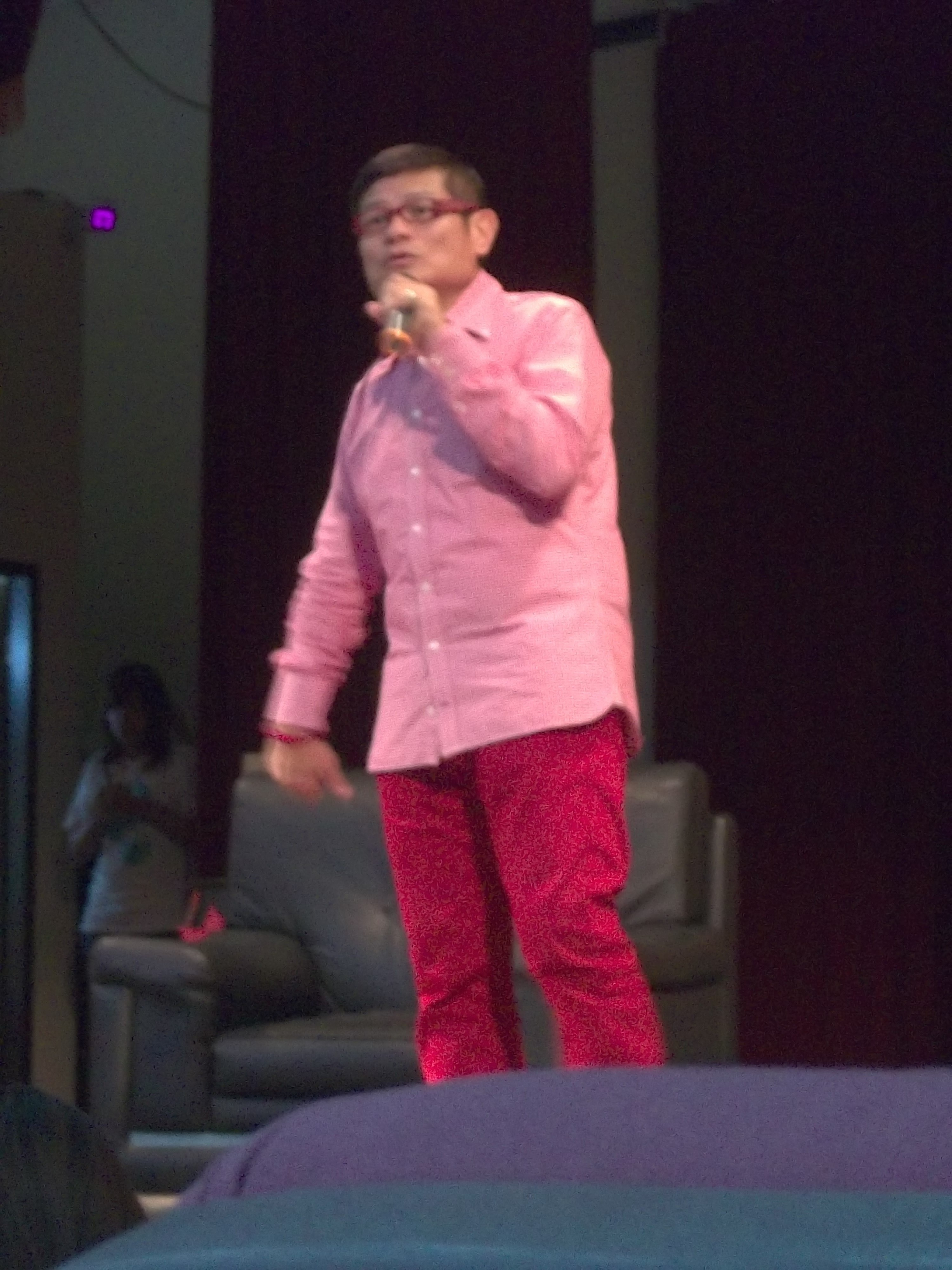 南台科技大學N棟音樂廳，南台科技大學學生自治會名人講座，許效舜演講「從石頭看人生」。